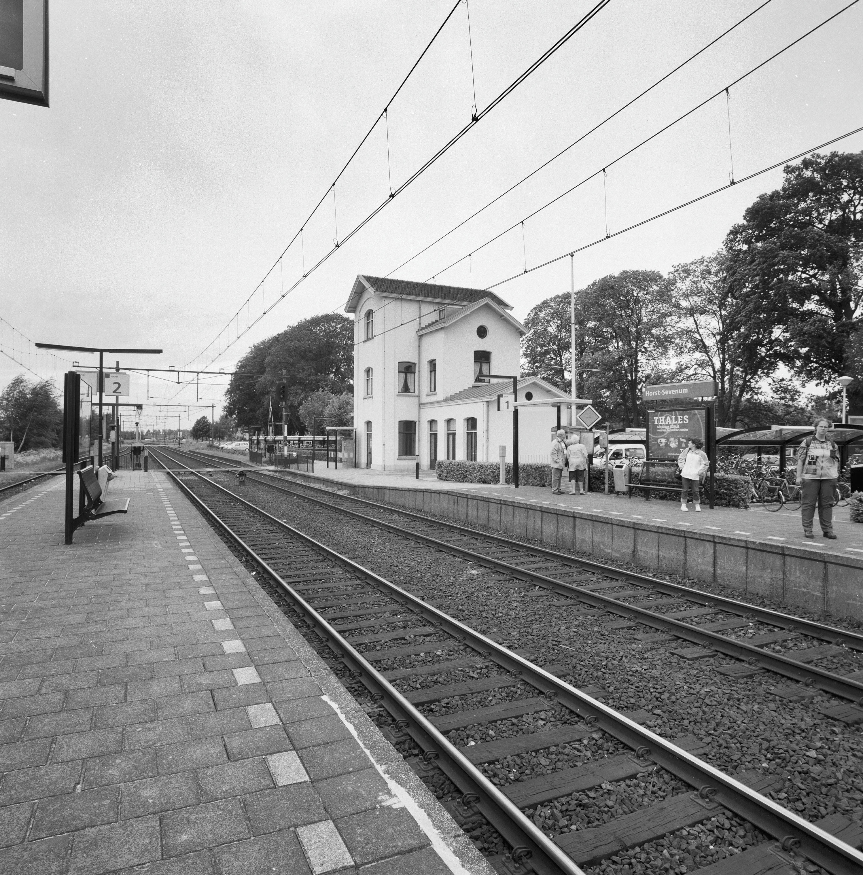 Station Horst-Sevenum: Overzicht achtergevel en linker zijgevel met rails op de voorgrond (opmerking: Gefotografeerd voor Monumenten In Nederland Limburg)